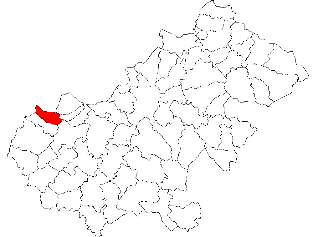 Categorie:Hărţi ale judeţului Satu Mare